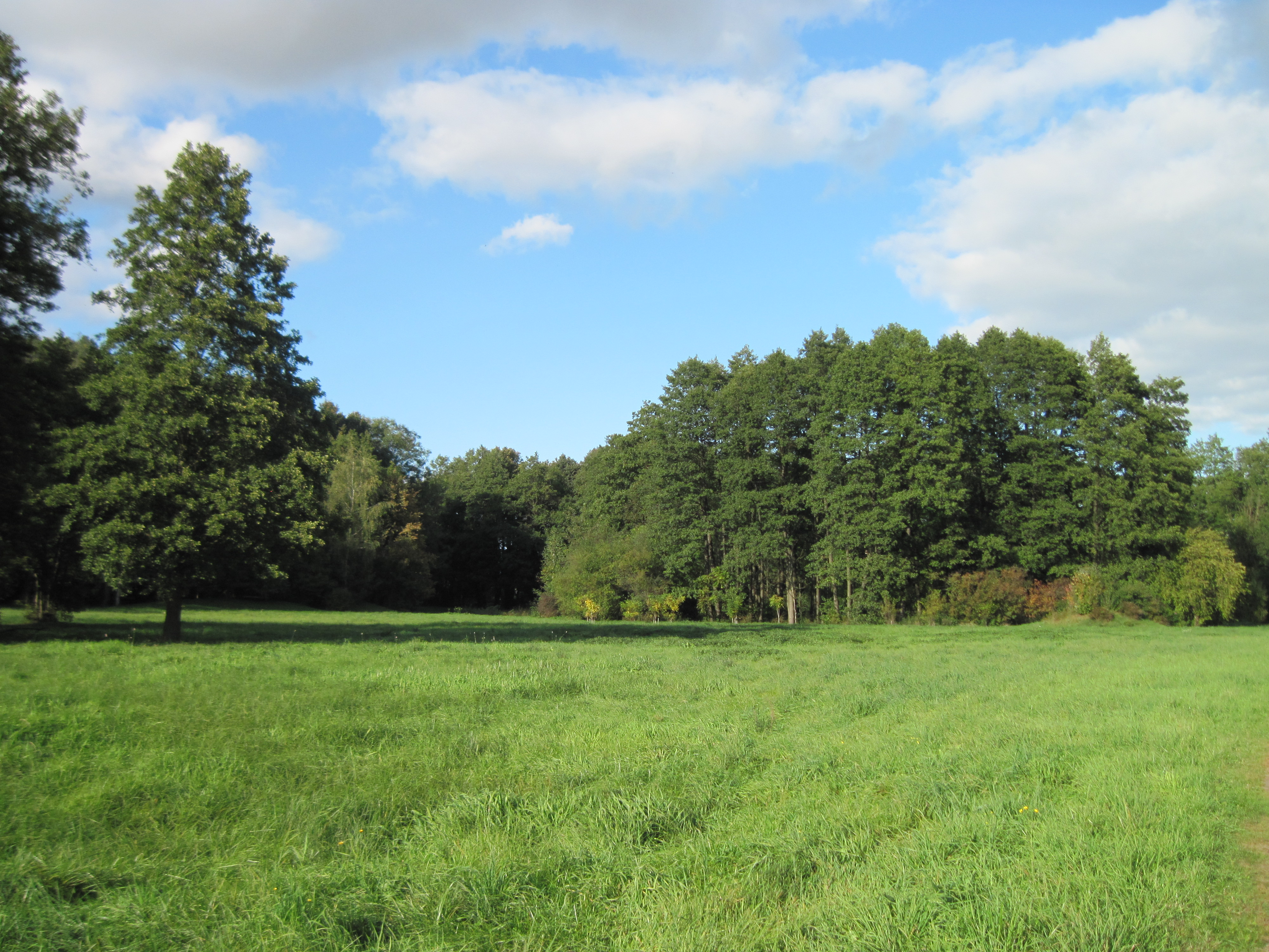 Японскі парк у Нясвіжы